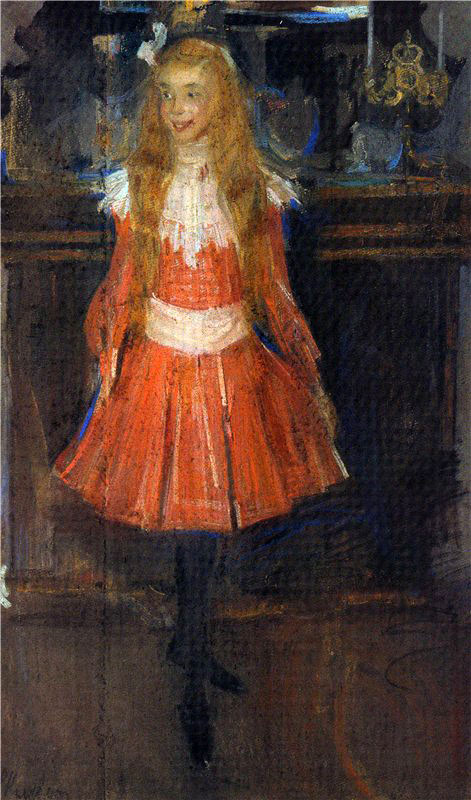 Лисичка. Портрет А.С.Боткиной, внучки П.М.Третьякова 1902 г